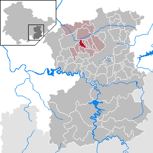 Döbritz in Thuringia - Saale-Orla-Kreis